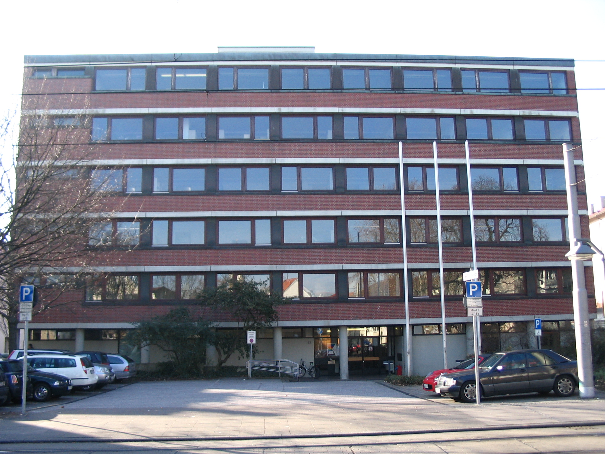 Das Gebäude des Amtsgerichts Stuttgart-Bad Cannstatt in der Badstraße 23 in Stuttgart-Bad Cannstatt.